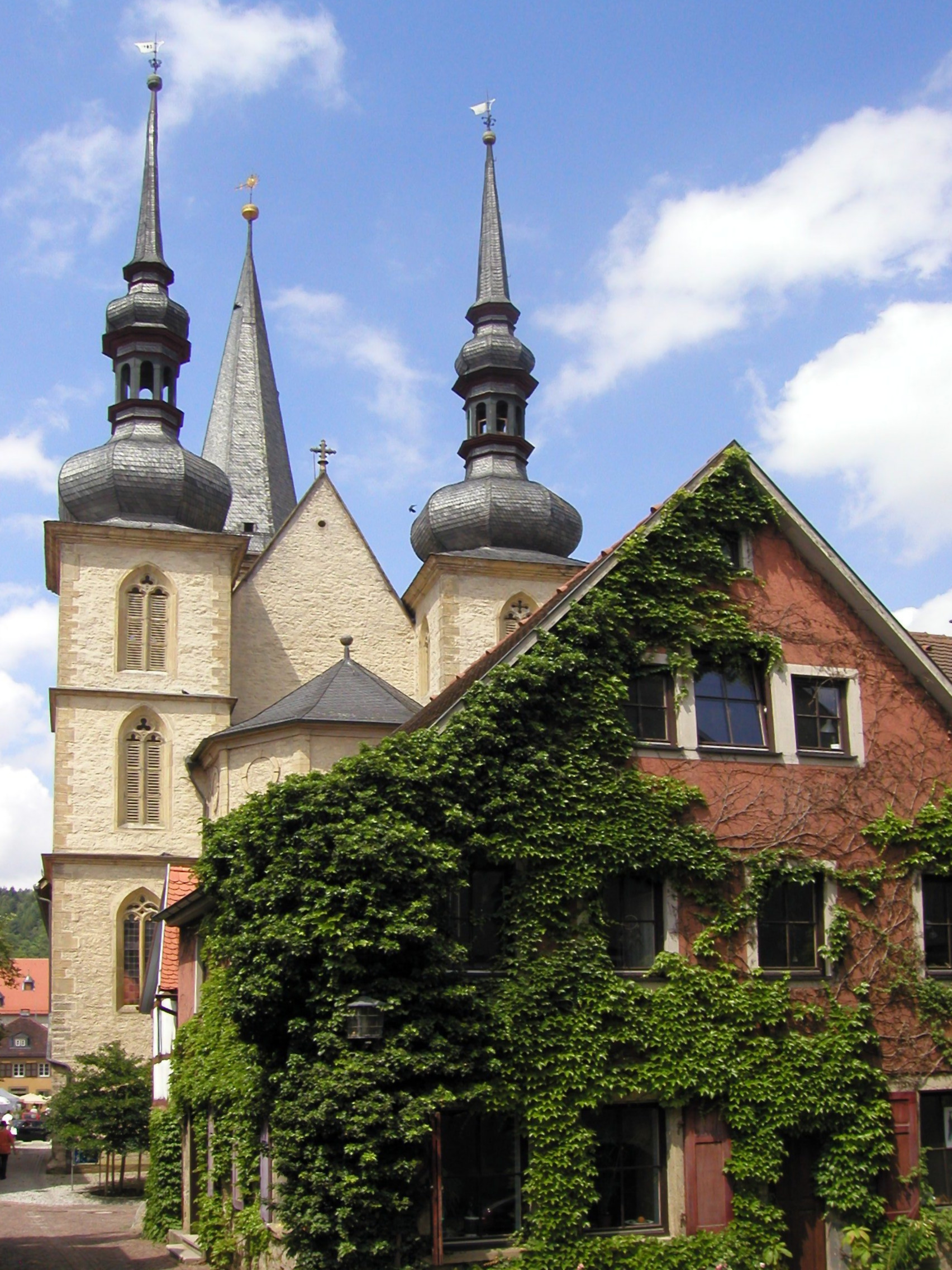 Stadtkirche St. Georg in Weikersheim Sonstiges: ...